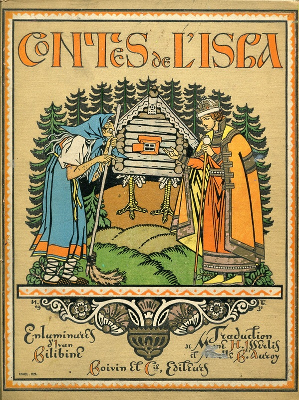 "Contes de L'isba" ["Избушка на курьих ножках"]. Русская народная сказка. На французском языке. 1949 год. Париж. 1949 г. 157 стр. Виньетки, заставки и иллюстрации И. Я. Билибина. В цветном издательском иллюстрированном переплете.